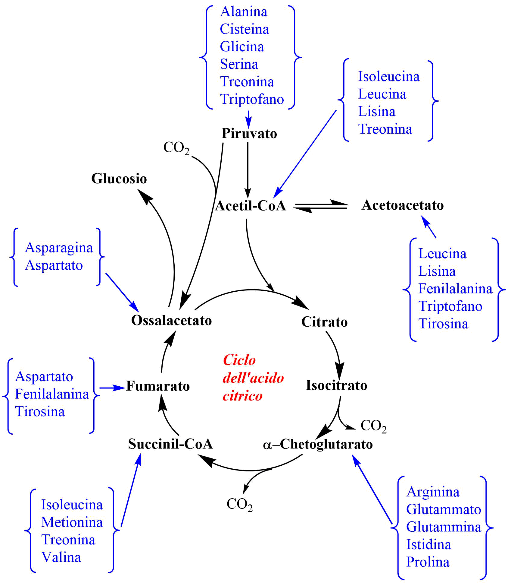 Ciclo dell'acido citrico